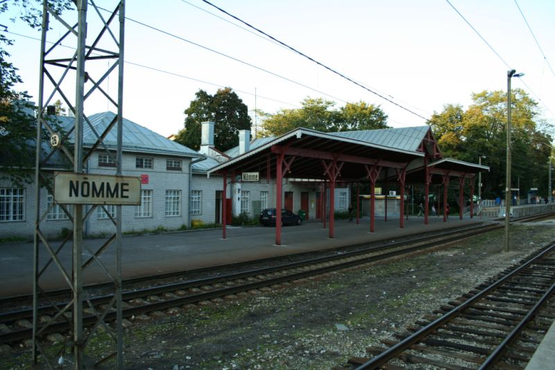 Nõmme train station. Author: Tanel Jõeäär